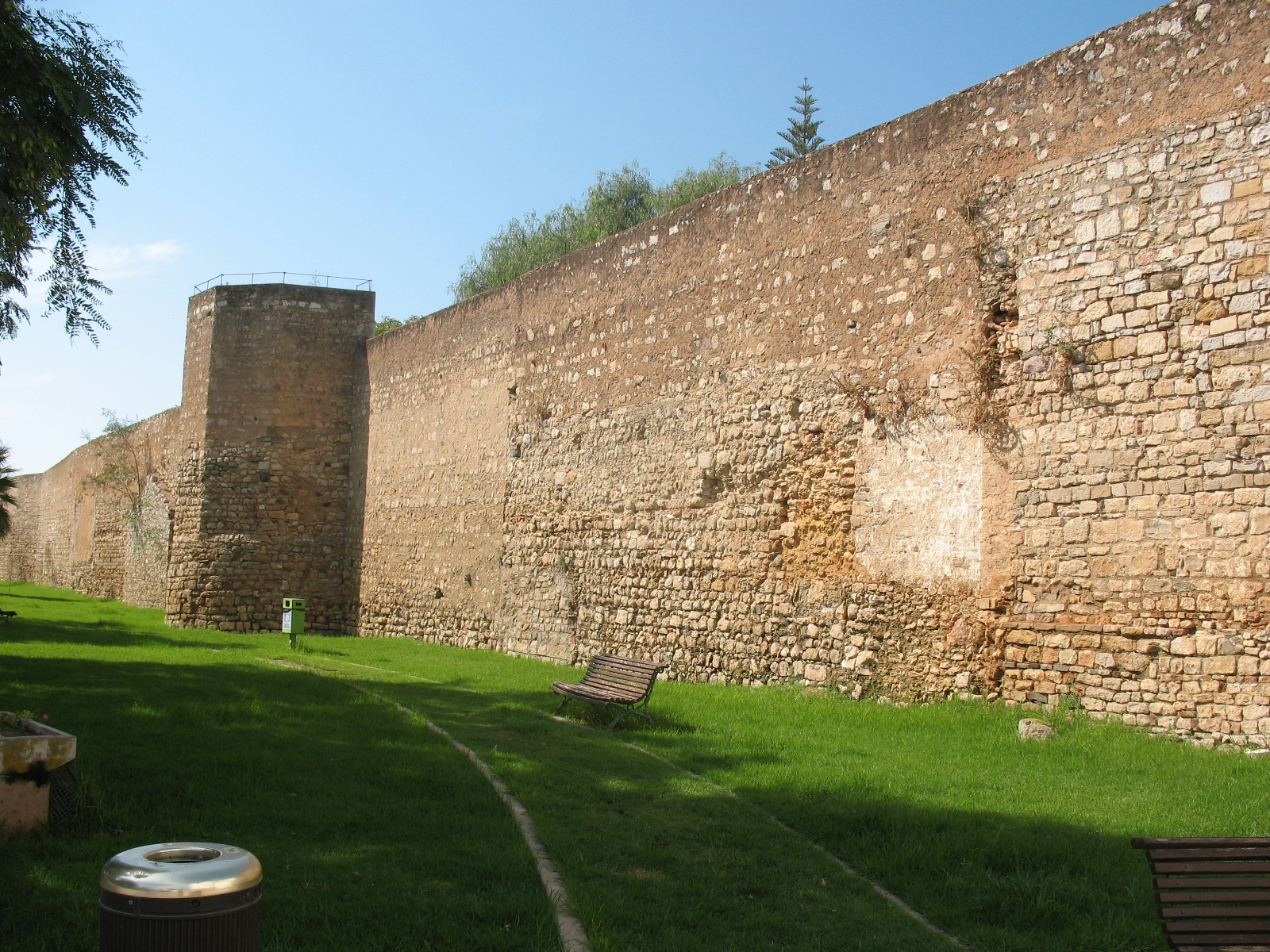 Крепостные стены города Фару.